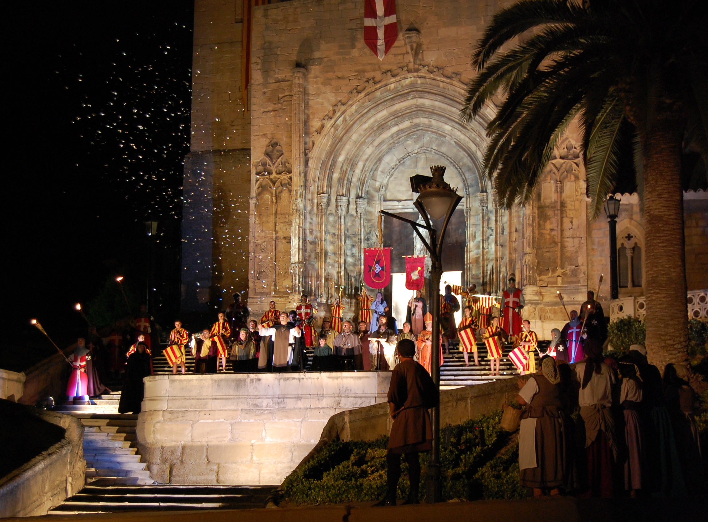 Recreación del Compromiso de Caspe